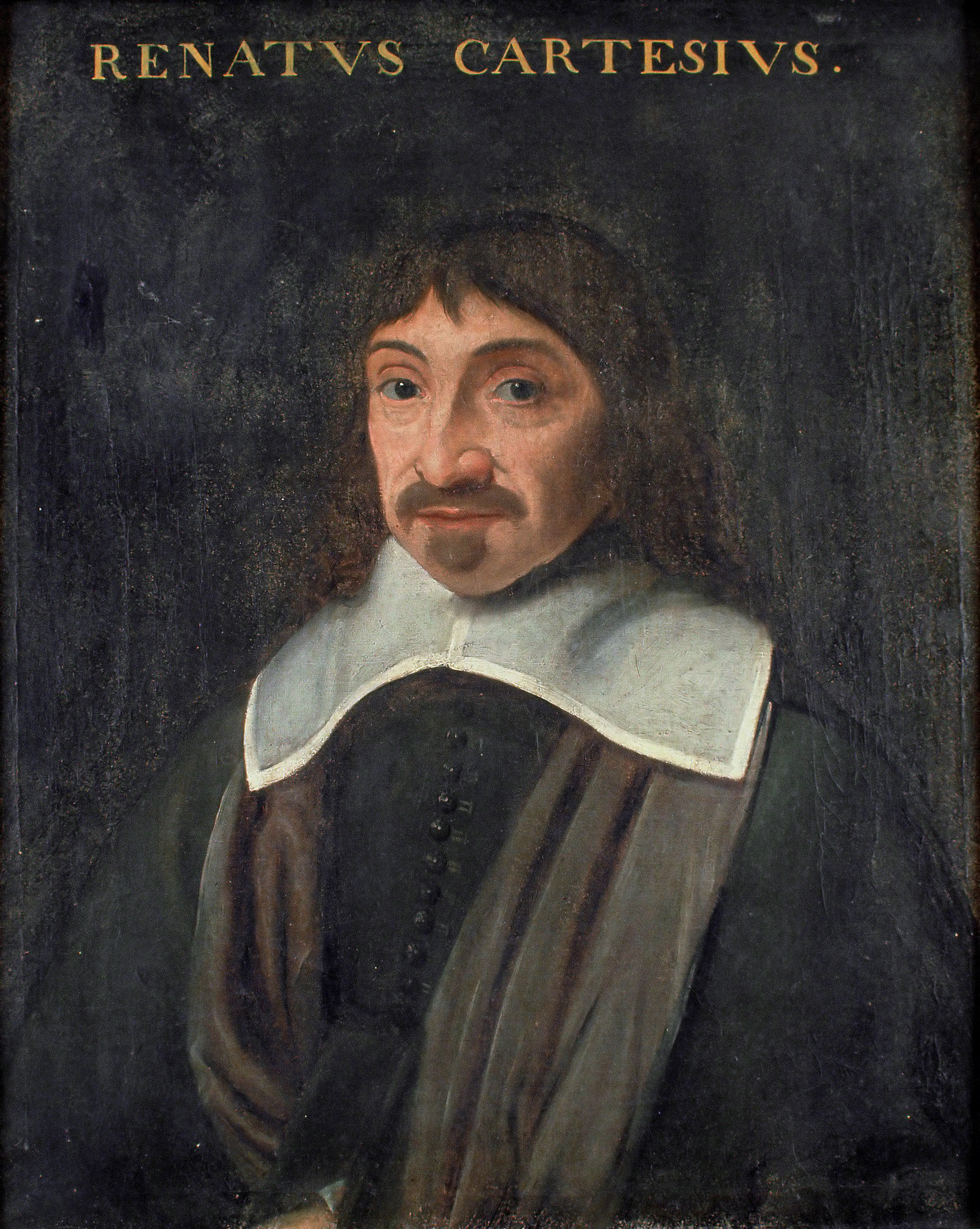 René Descartes, filosoof en wiskundige oil on canvas 65 x 52 cm 17th century